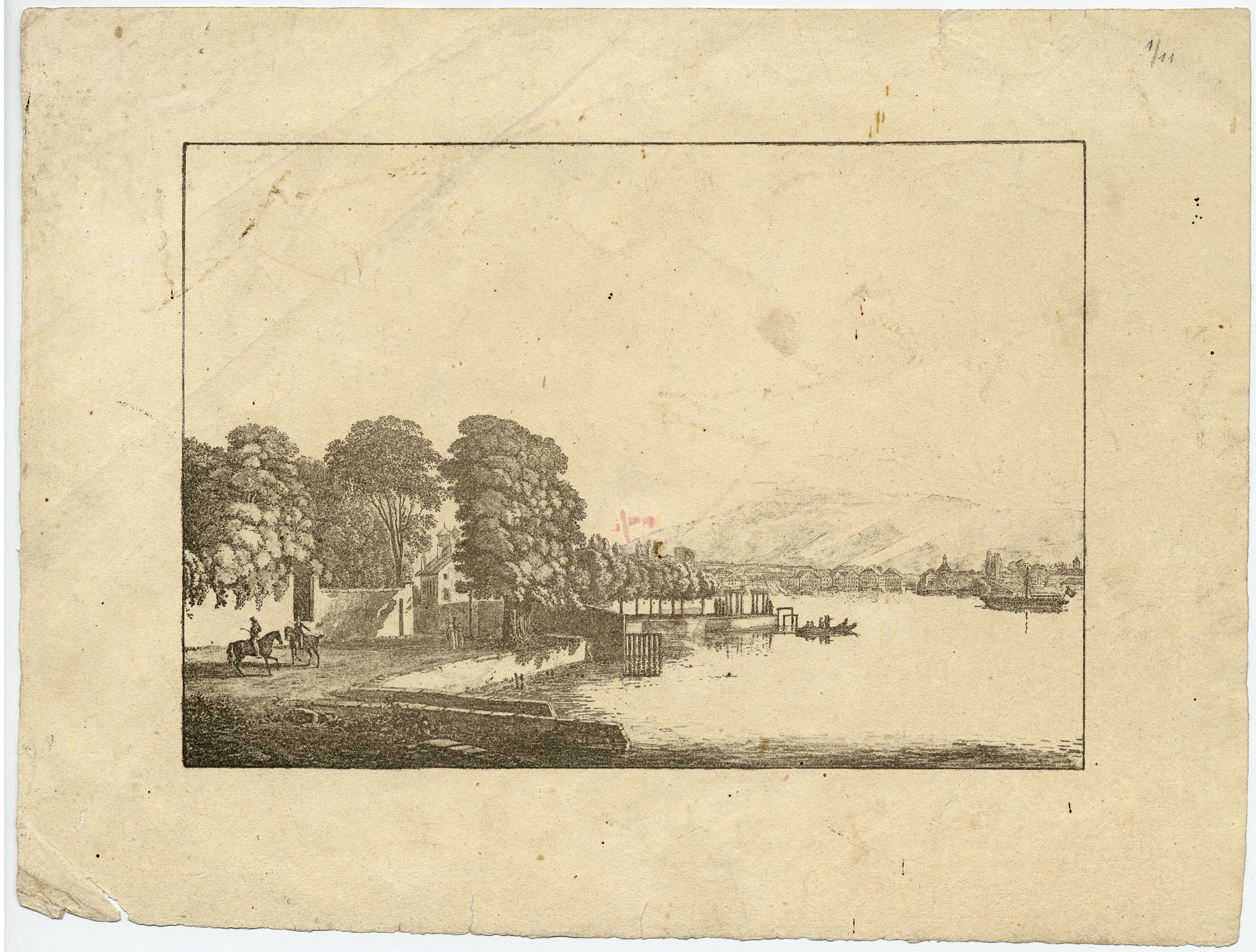 Bains Lullin sur le Léman vers 1830 sur la grève des Eaux-Vives à la hauteur du Parc la Grange actuel. Le bateau Guillaume-Tell est visible en arrière plan.